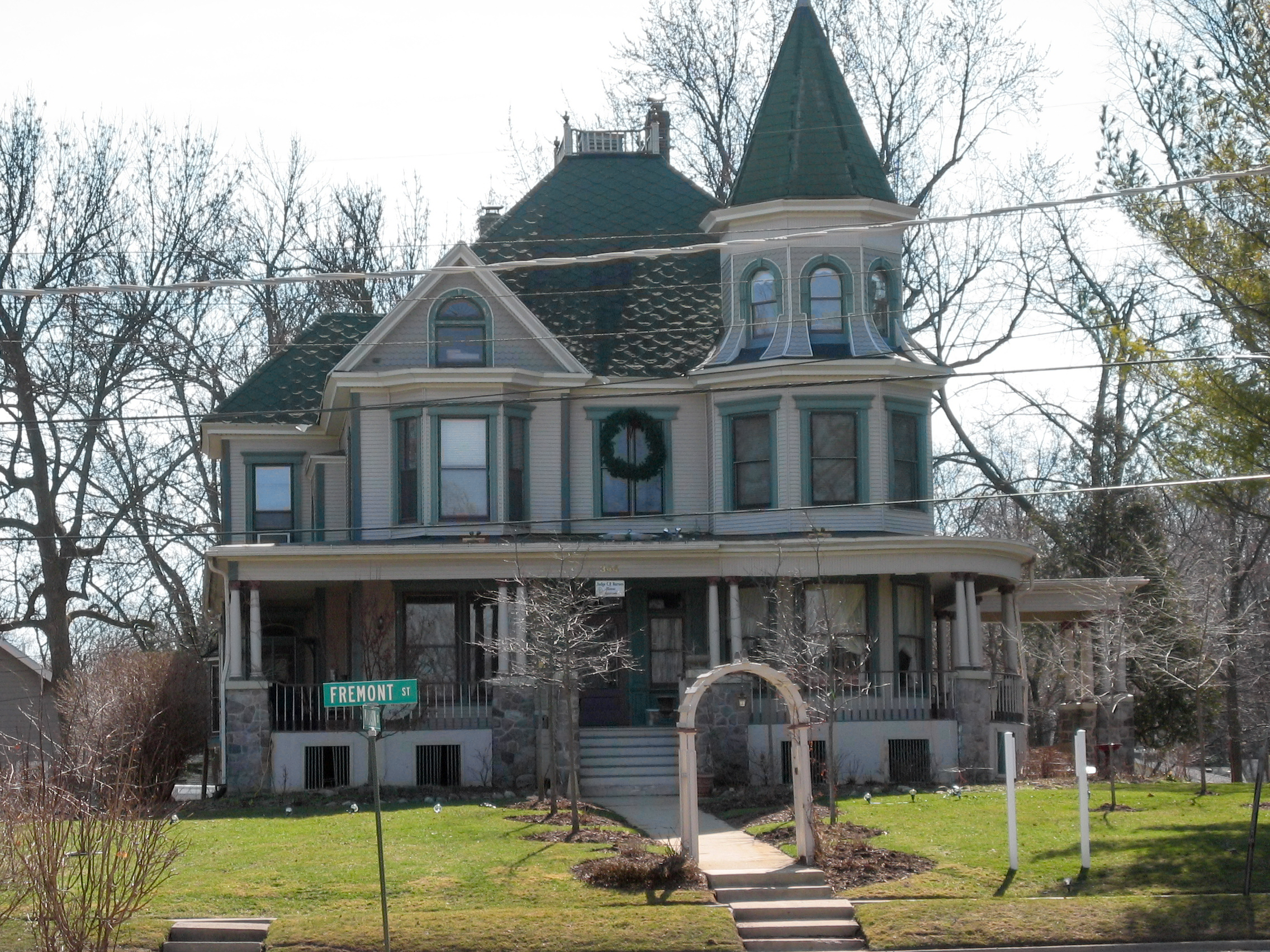 Drehort „Und täglich grüßt das Murmeltier“ (1992), Woodstock, Illinois, USA